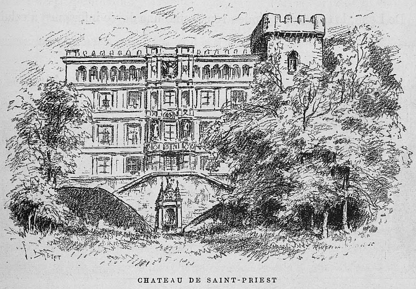 Aux environs de Lyon / Monsieur Josse ; préface de M. Coste-Labaume ; édition illustrée de 250 dessins de J. Drevet.